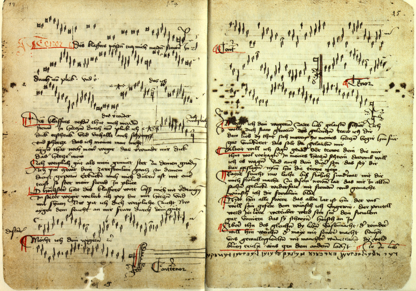 Lochamer Liederbuch, Berlin, Staatsbibl., Ms. Mus. 40613, Bl. 14v-15r